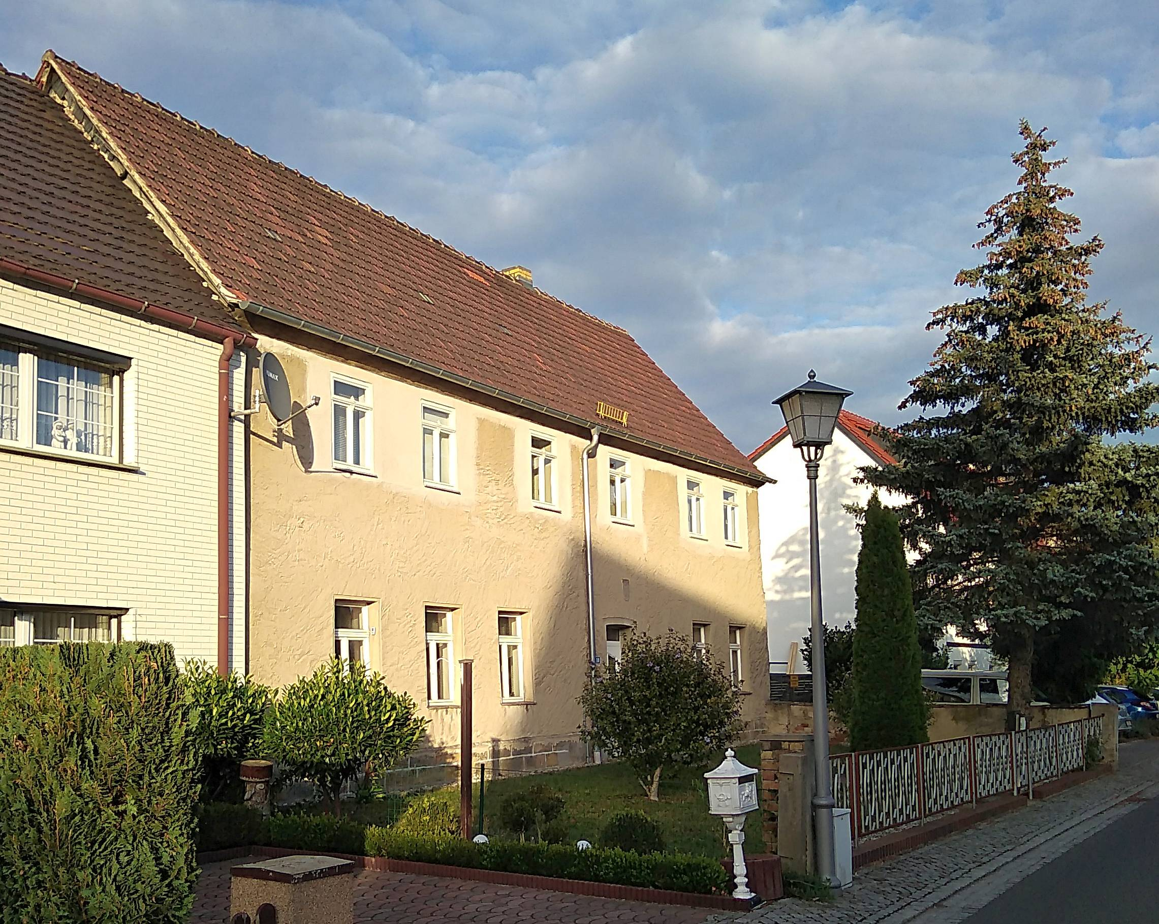 Das Baudenkmal Rathausstraße 10 in Elsterwerda